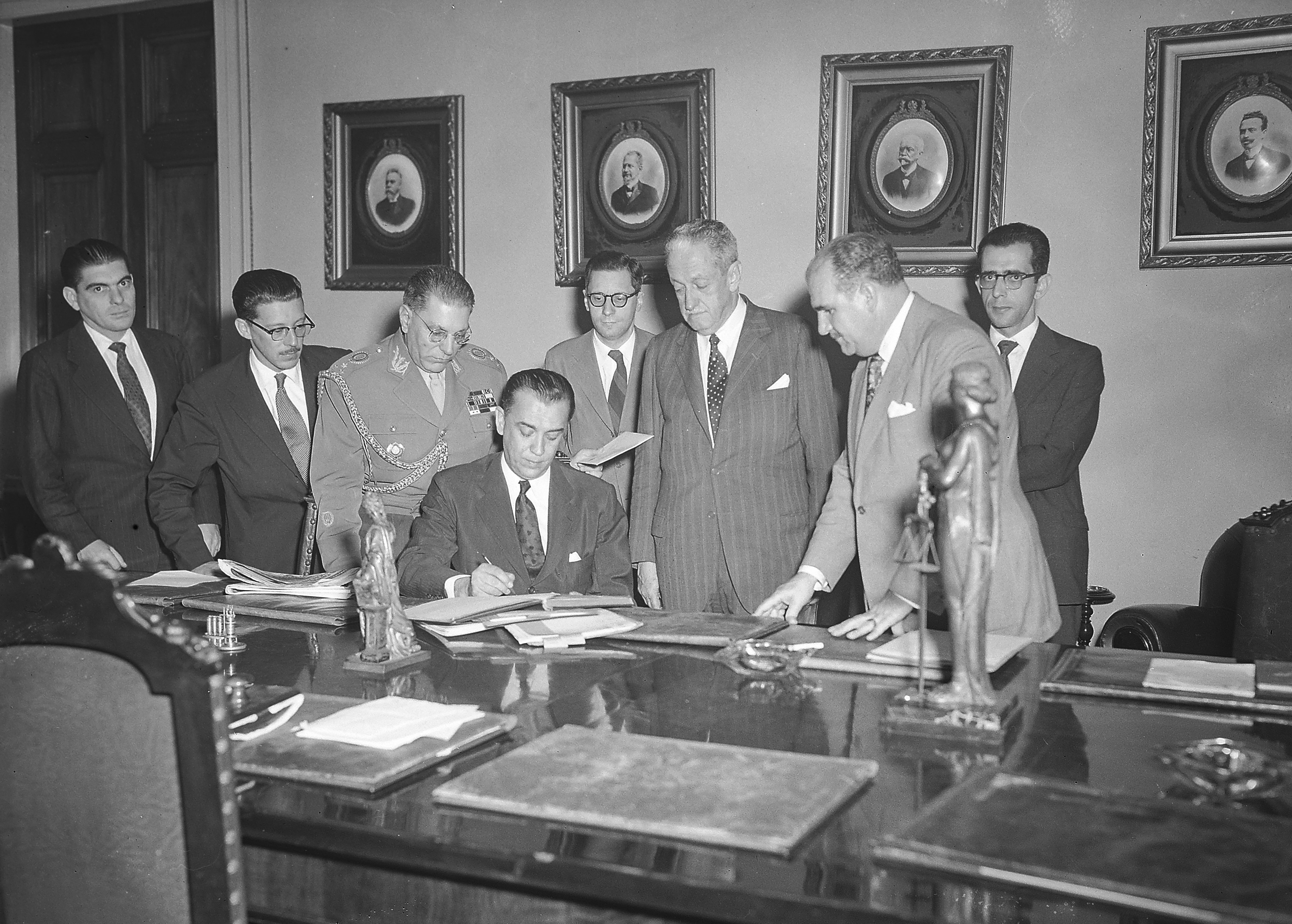 Imagem do Fundo Agência Nacional, do Arquivo Nacional